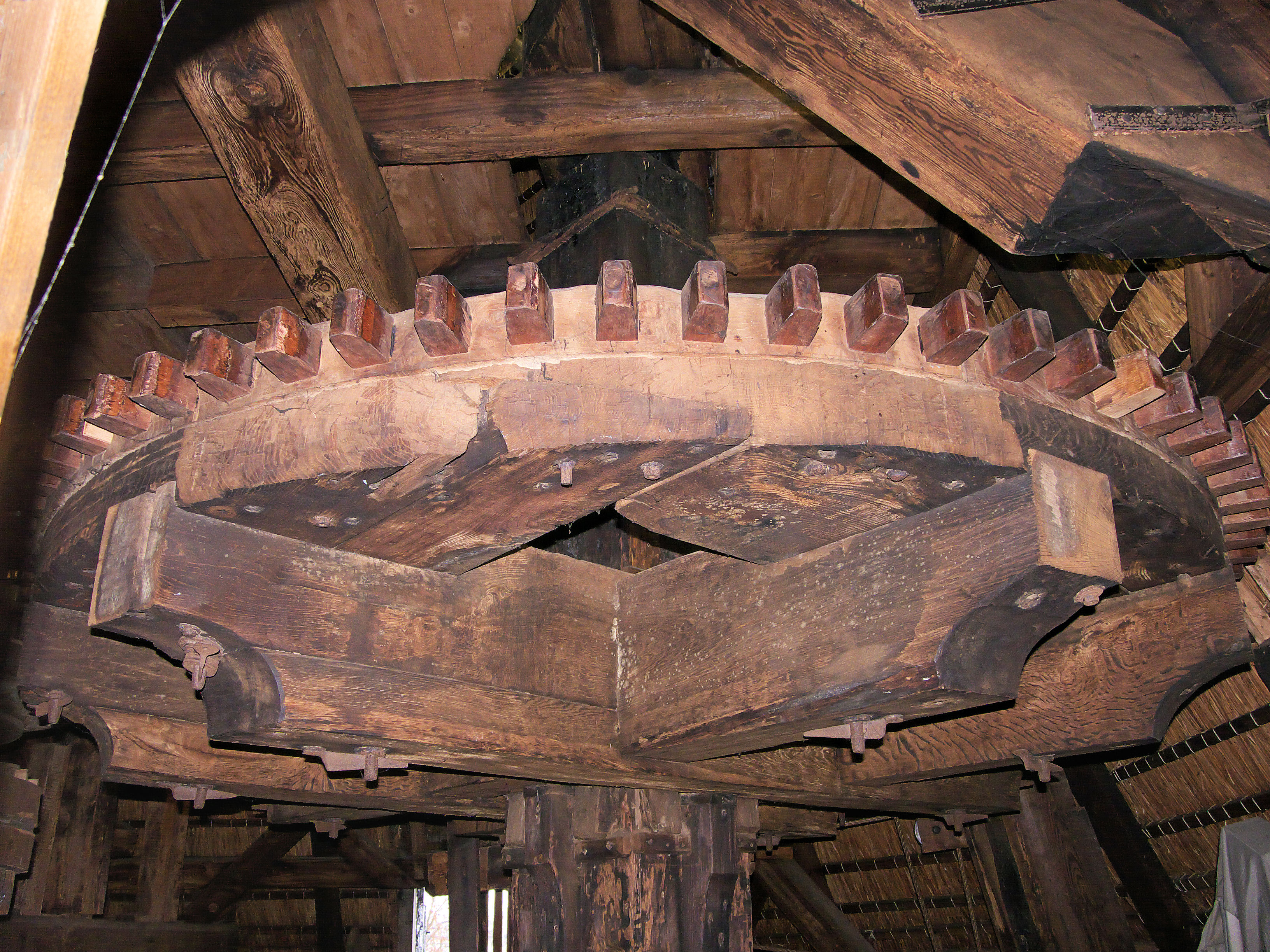 Molen De Passiebloem steenwiel